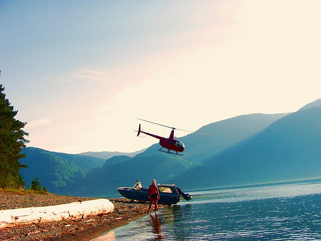 На аэровизуальную съёмку от кордона Челюш.